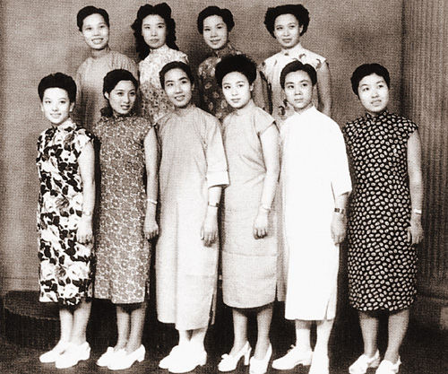 中文（中国大陆）: 1947年上演山河恋时所摄